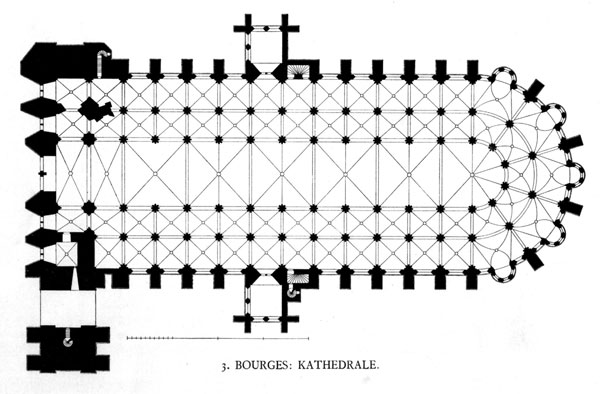 Bourges. Floorplan, from Plan, from G. Dehio and G. v. Bezold, Die Kirchliche Baukunst des Abendlandes, Stuttgart, 1887-1902, fig 362 Lithograph